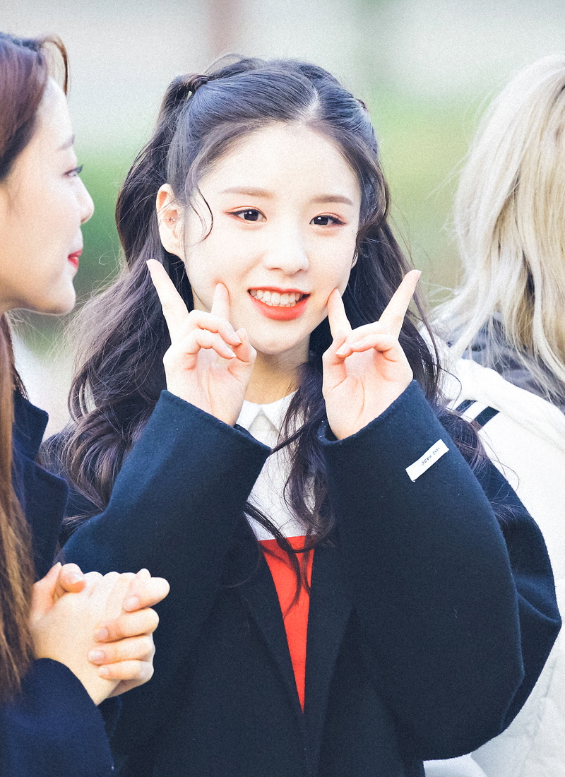 20181013 이달의 소녀 음악중심 미니 팬미팅